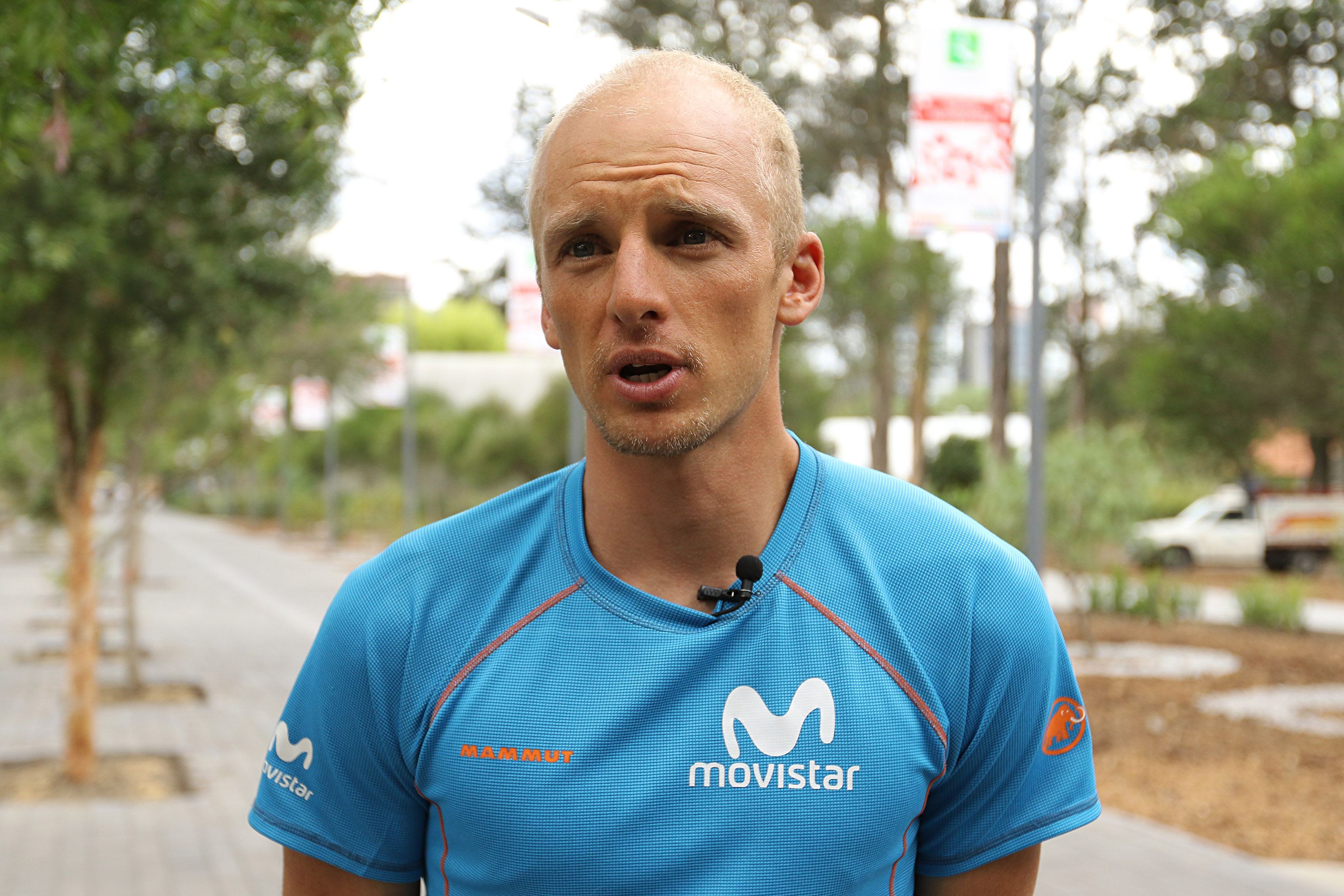 Quito, 23 Jul (Andes).- Karl Egloff, deportista suizo-ecuatoriano, que se ha desempeñado en el ciclismo y el montañismo, ofreció entrevista a Andes. Fotografías: Carlos Rodríguez/Andes.